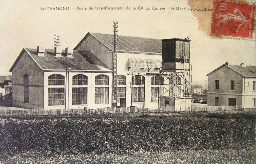 Saint-Martin-en-Coailleux (Loire), poste de transformateur de la Cie du Centre, carte postale ancienne (non grevée de droits).